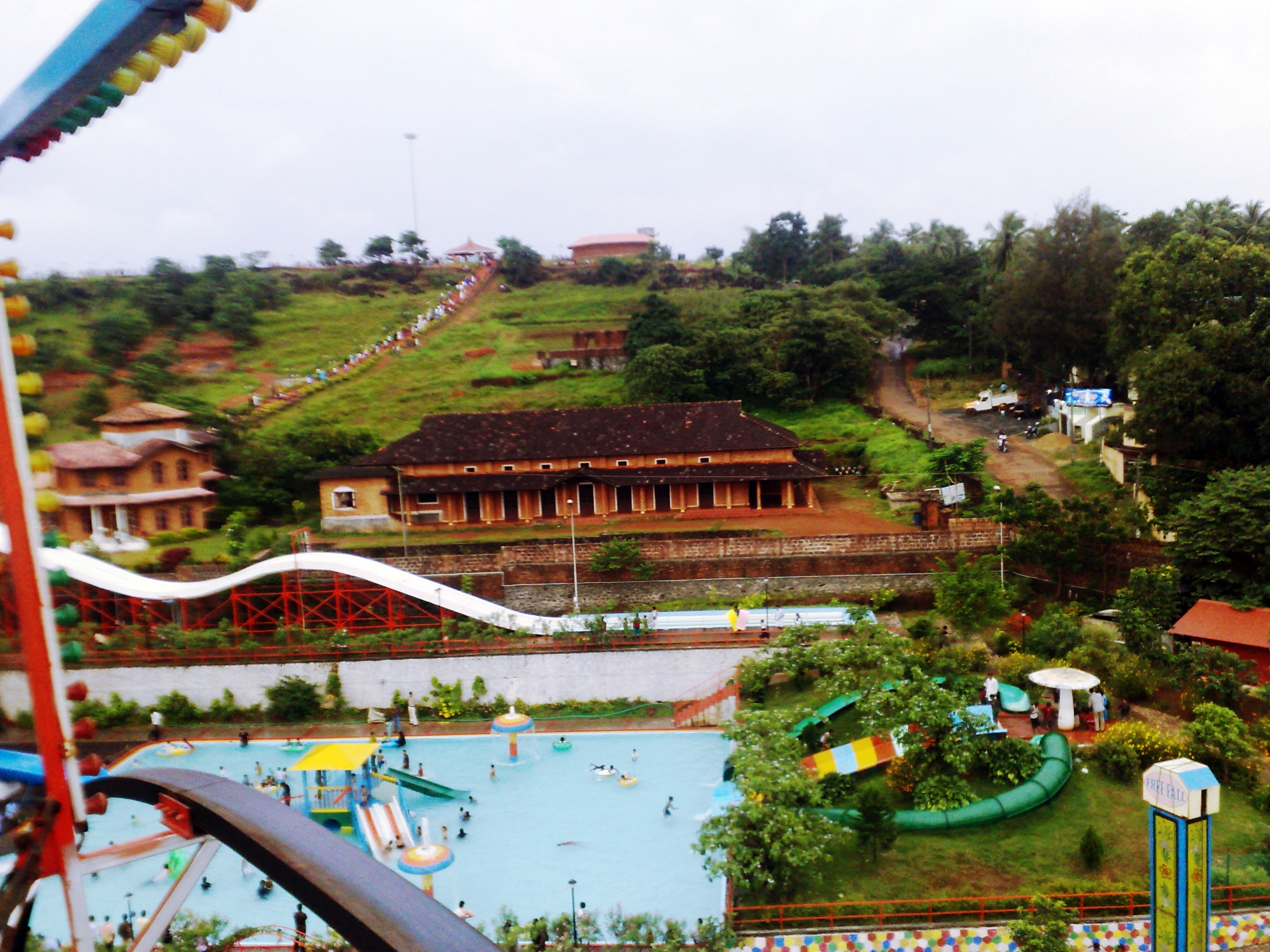 കോട്ടക്കുന്ന്